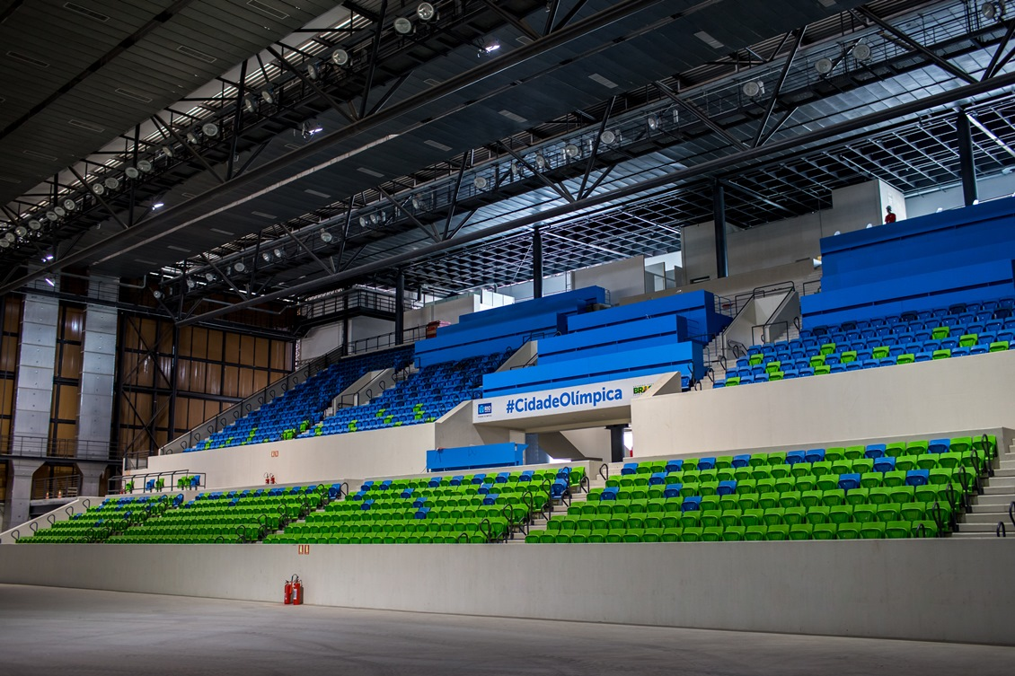 Interno dell'Arena da Juventude